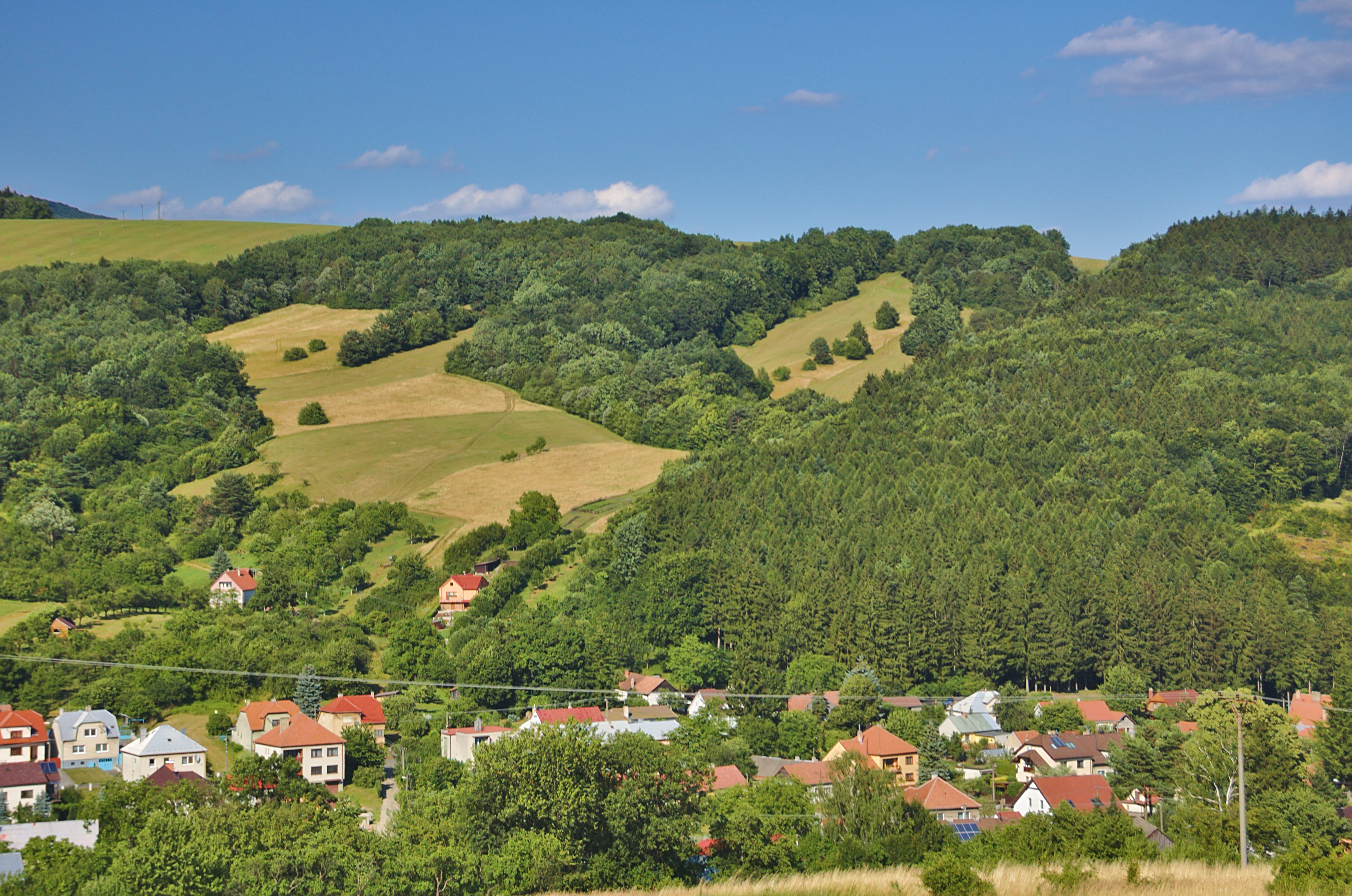 Pohled na Květnou a Novou horu od západu, Strání, okres Uherské Hradiště